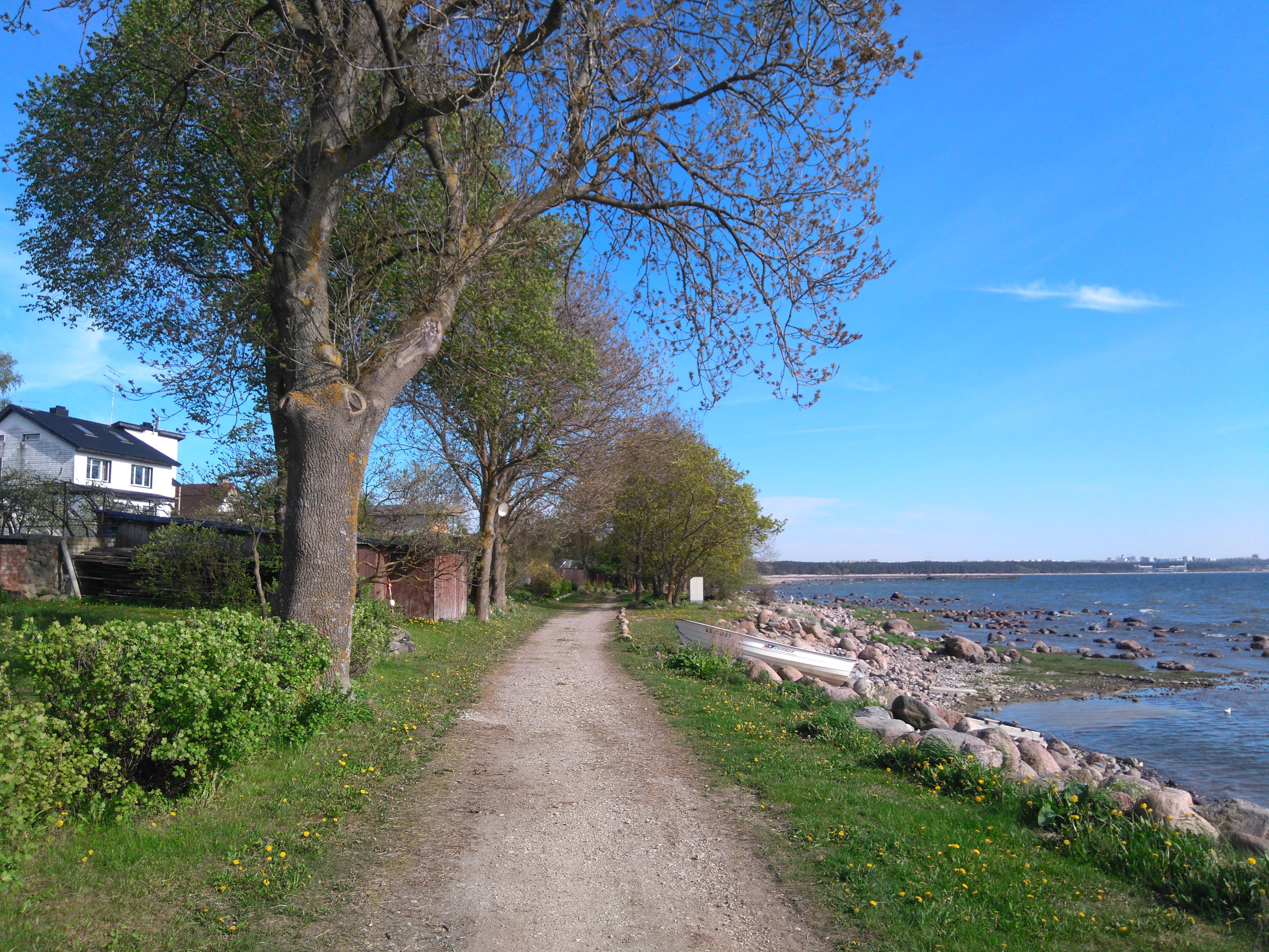 Lahe tee, Miiduranna.